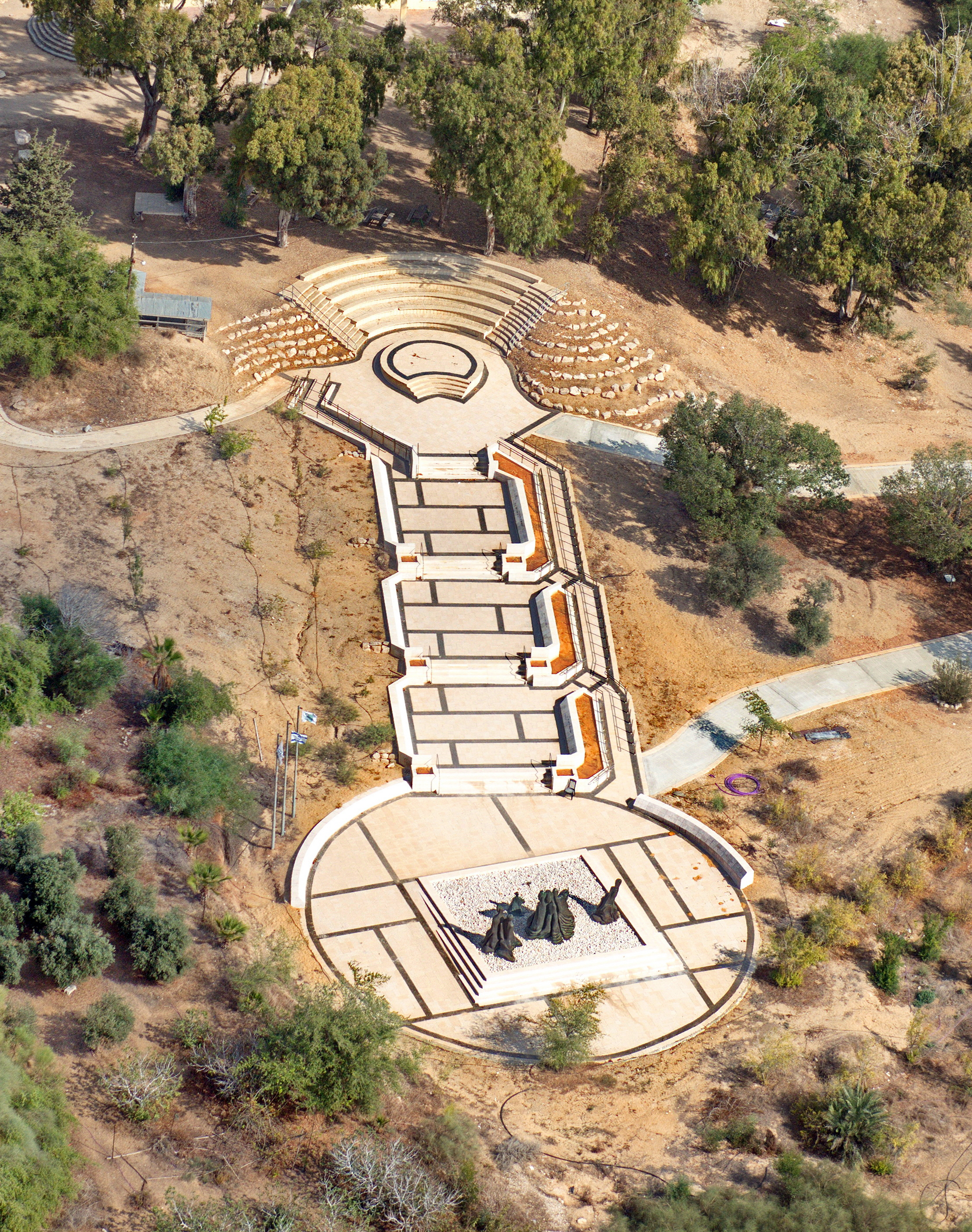 אנדרטה באתר של ניצנים הישנה. במקום מספר פסלי ברונזה של נשים שפיסלה הפסלת שוש חפץ. האתר נחנך בשנת 1998 במלאת 50 שנה לקרב על ניצנים ומוקדש לשלוש לוחמות שנפלו בקרב: מירה בן ארי, שולמית דורצ'ין ודבורה אפשטיין.